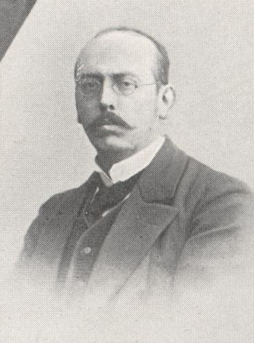 Georg Heim, Politiker und Bauernführer in Bayern